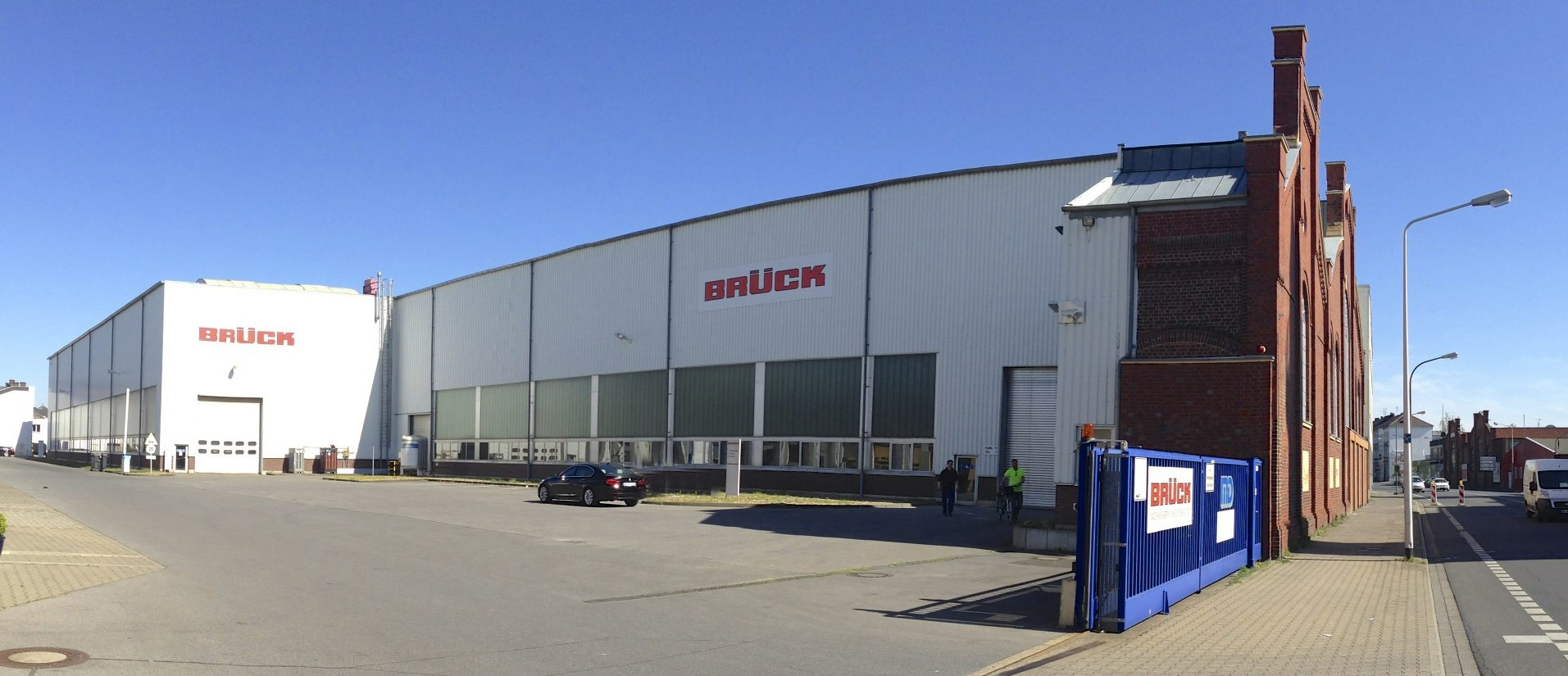 Fabrikhallen der Firma M. BRÜCK GmbH & Co. KG